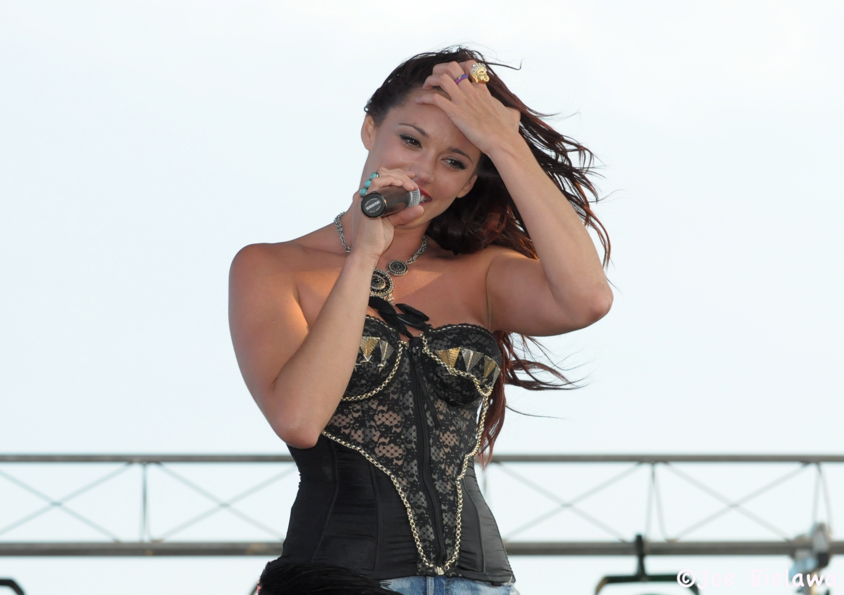 Jessica Sutta - DS Pride -DSC_2586- 9.1.12